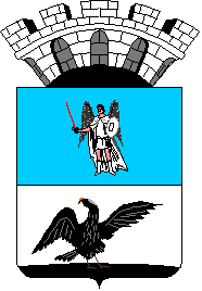 Герб Таращі 1852 року